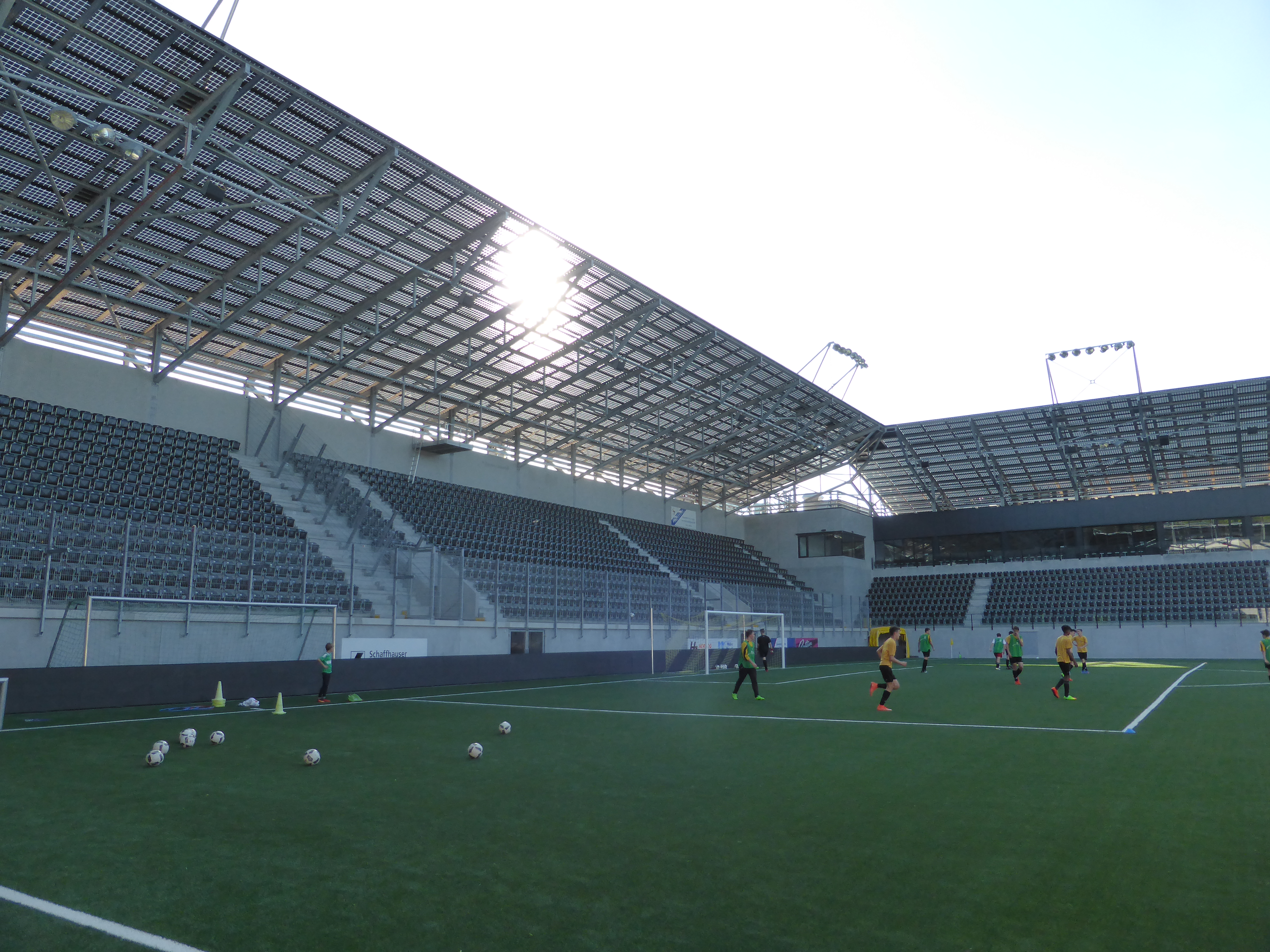 Lipo Park Schaffhausen, Fotovoltaikdach